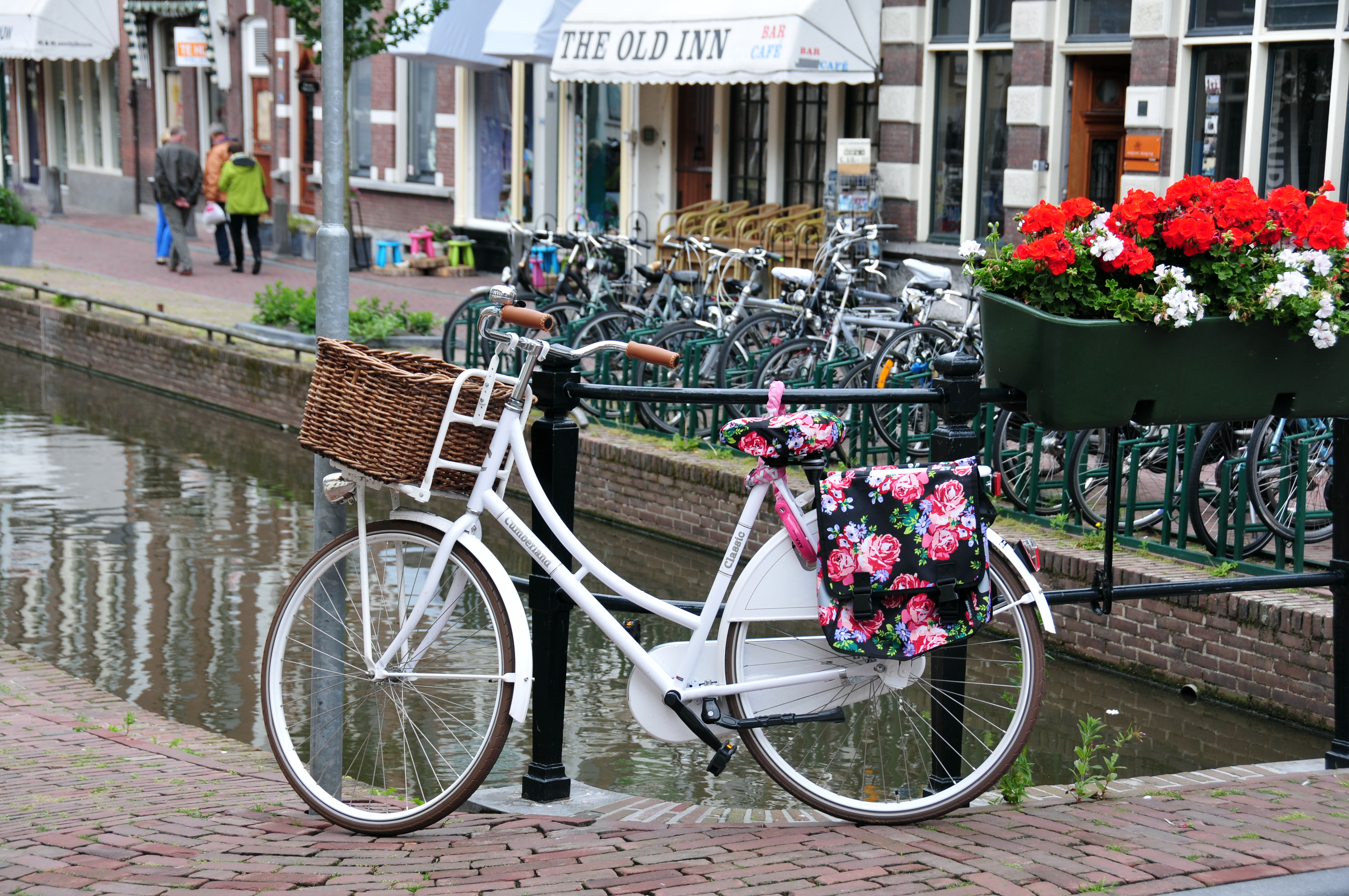 Gouda, Niederlande, Stadtzentrum